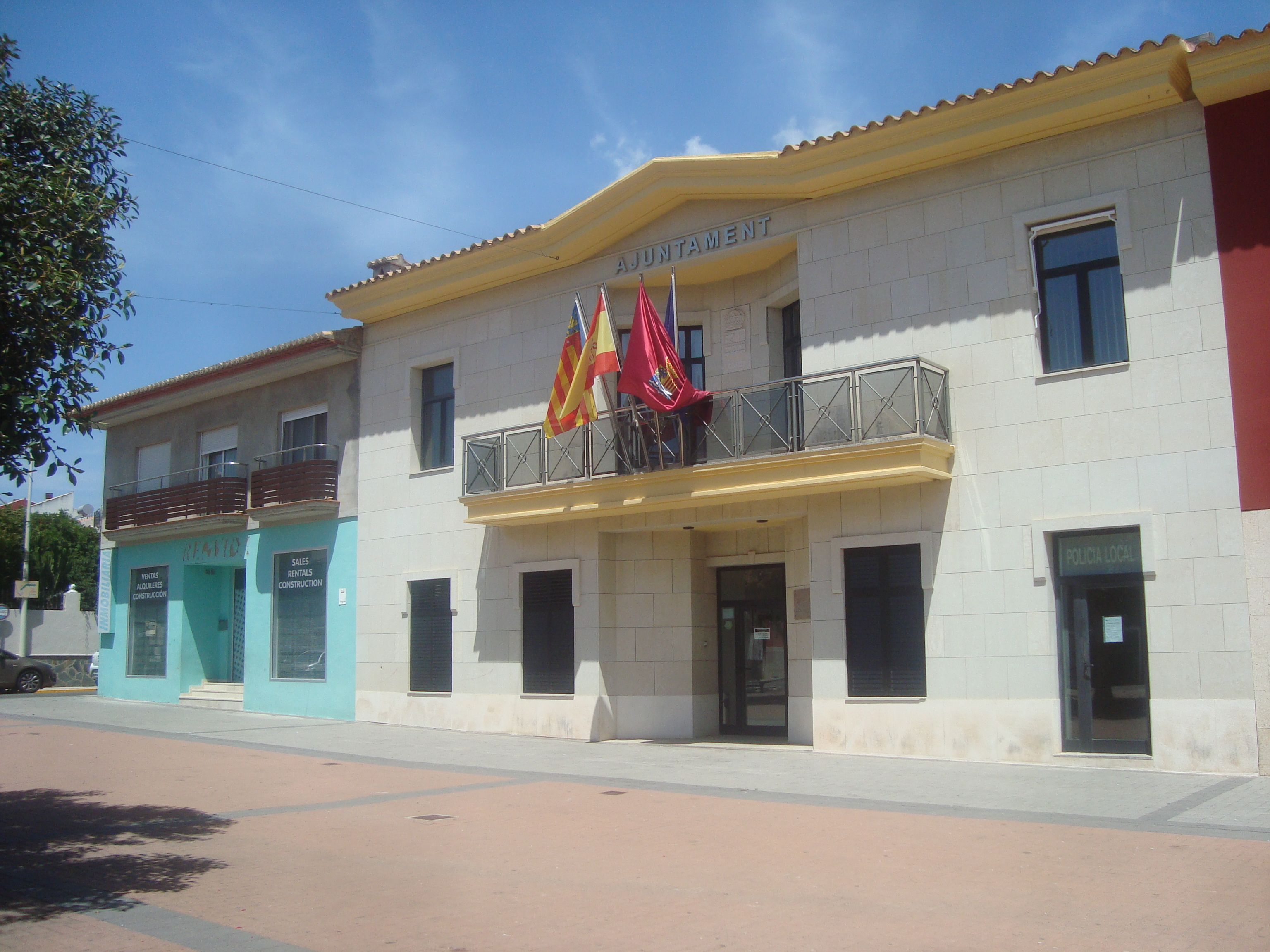 Ayuntamiento de Beniarbeig (Alicante)